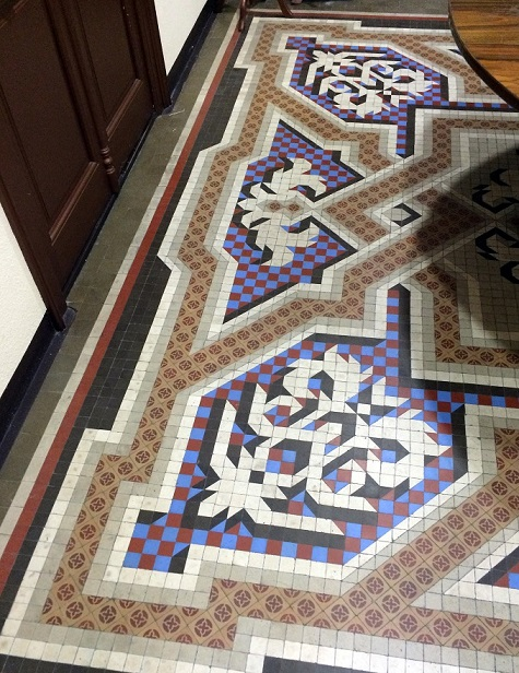 Mosaico Nolla, a modo de alfombra, situado en el Museo Festero de Villena